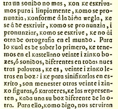 Extracto del Libro "Ortografia Kastellana nueva i perfeta"